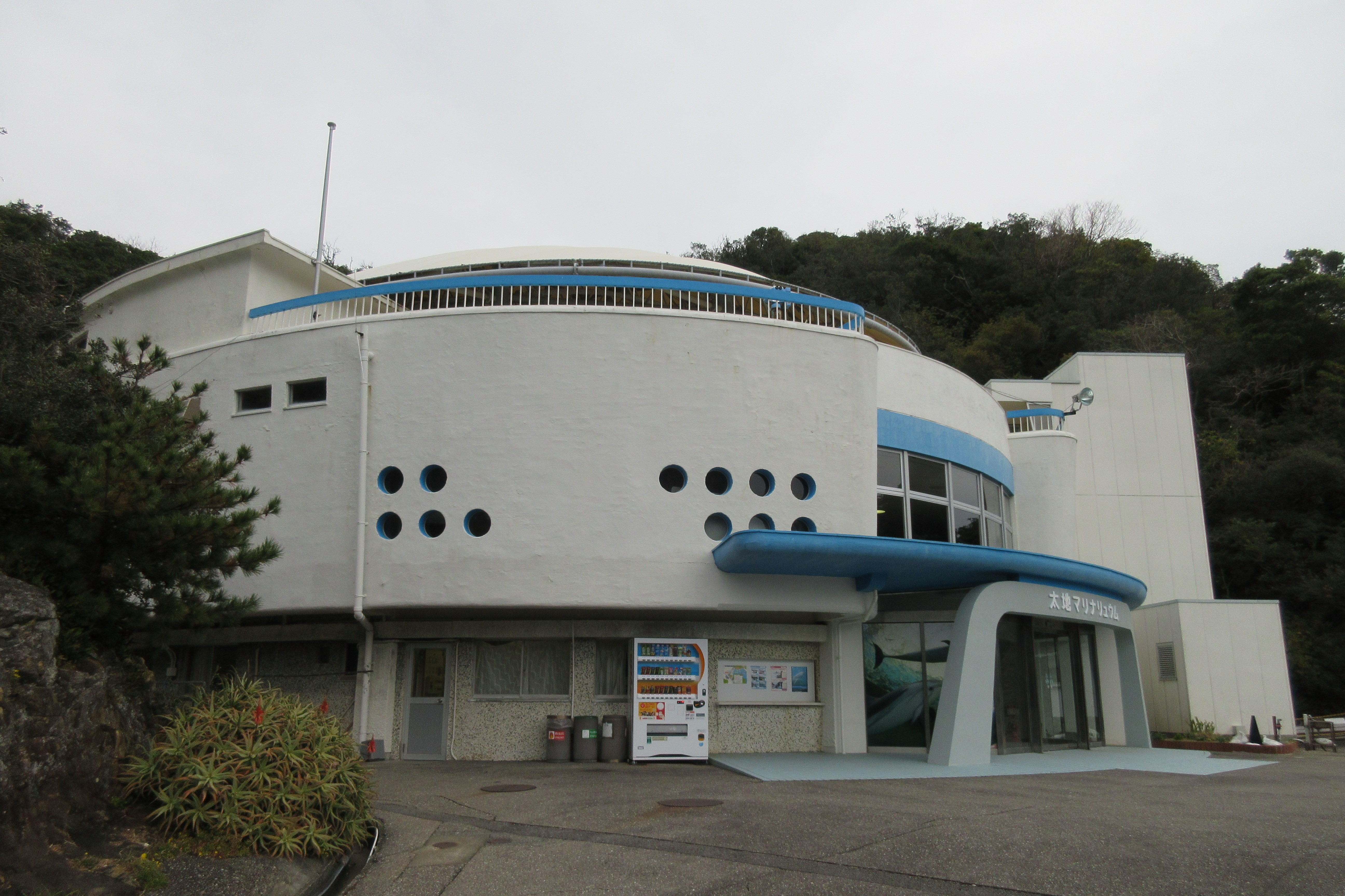 太地町立くじらの博物館海洋水族館